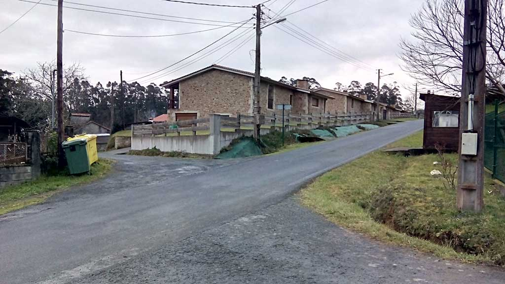 Vista dos Bidueiros, Pedroso, Narón.